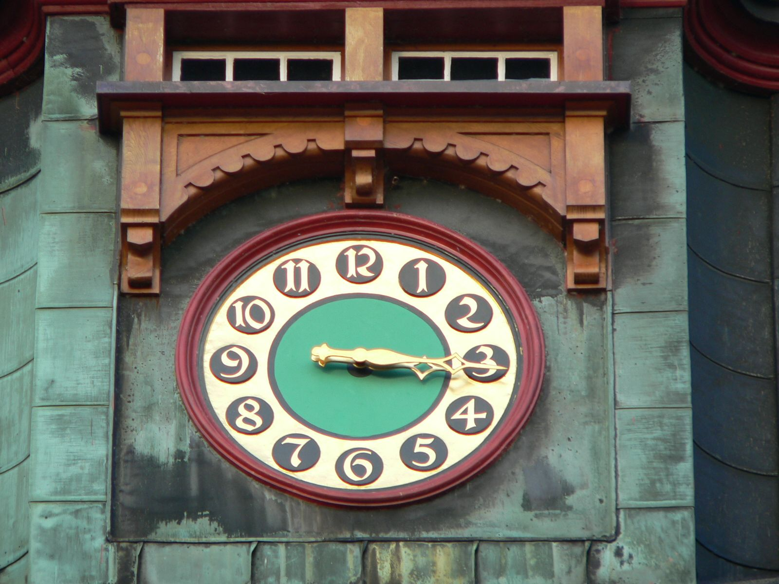 Konstanz, Germany, Hotel Barbarossa